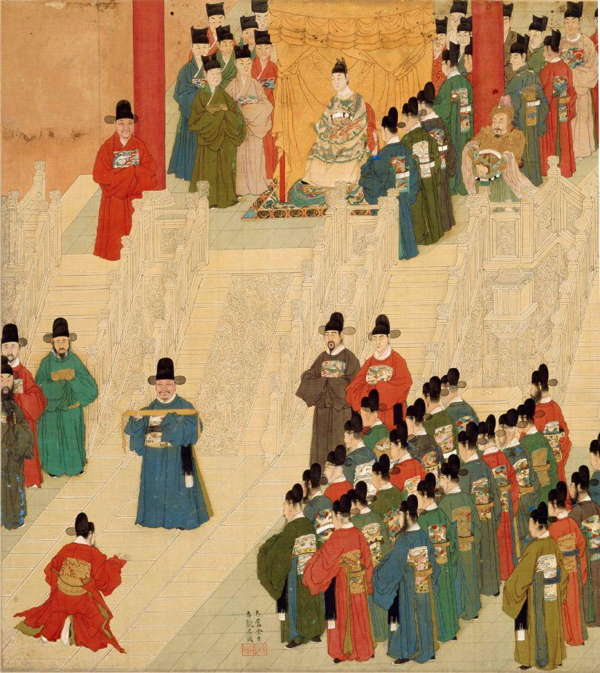 金臺吹敕，時年四十一